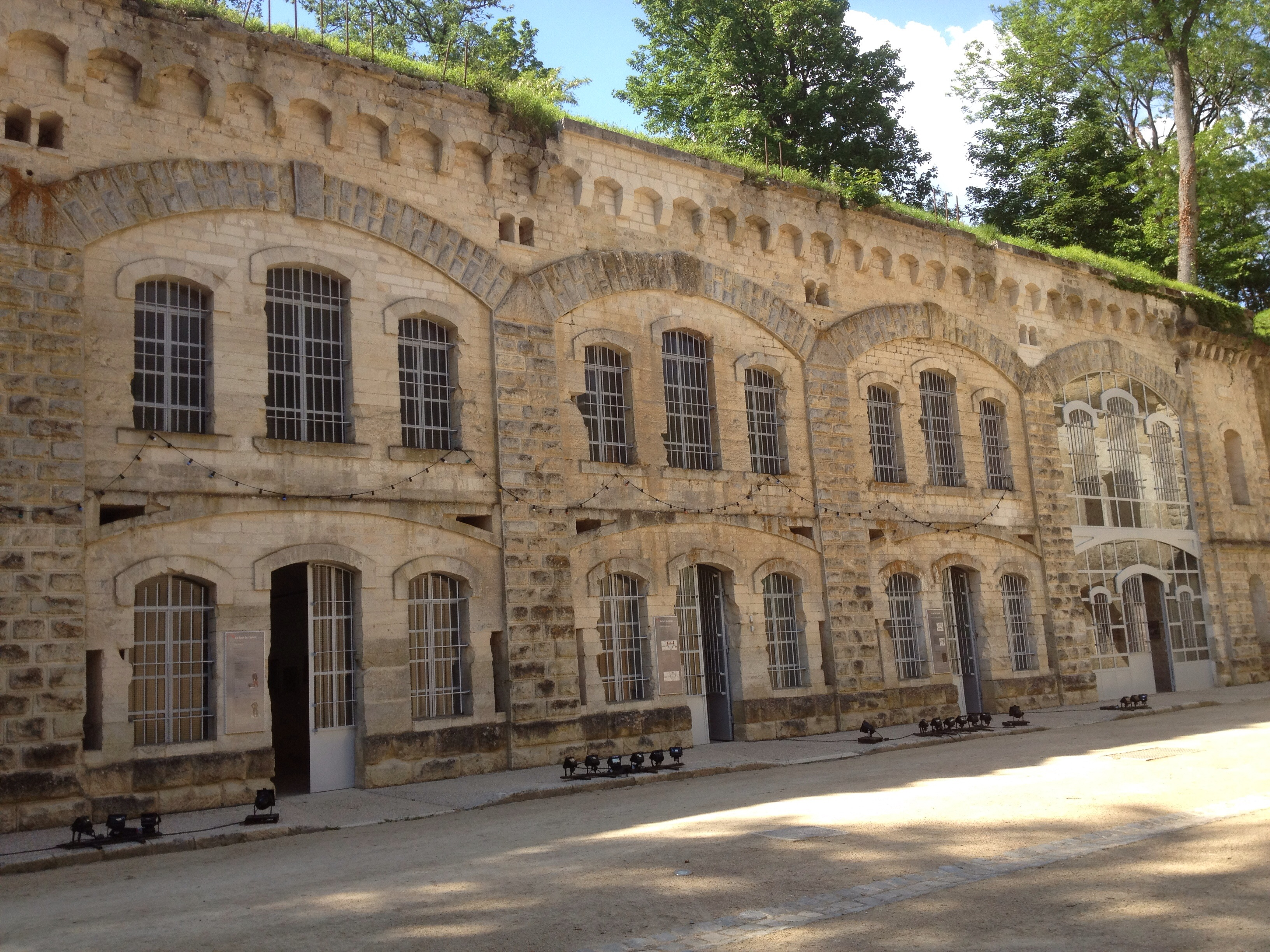 Casernement à l'intérieur du fort de Condé (Aisne)